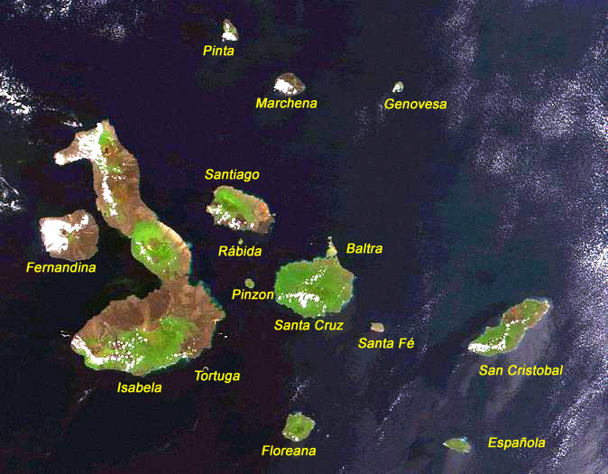 Galapagos Inselen Source:Dëst Bild staamt vun enger Satellitefoto déi vun der NASA gemaach gouf an déi dowéinst "public domain" ass. D'Schrëft staamt vum User:Cornischong